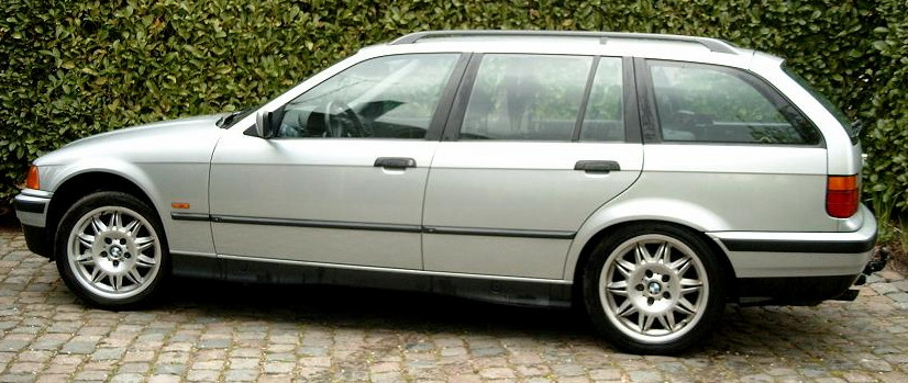 Eigen foto